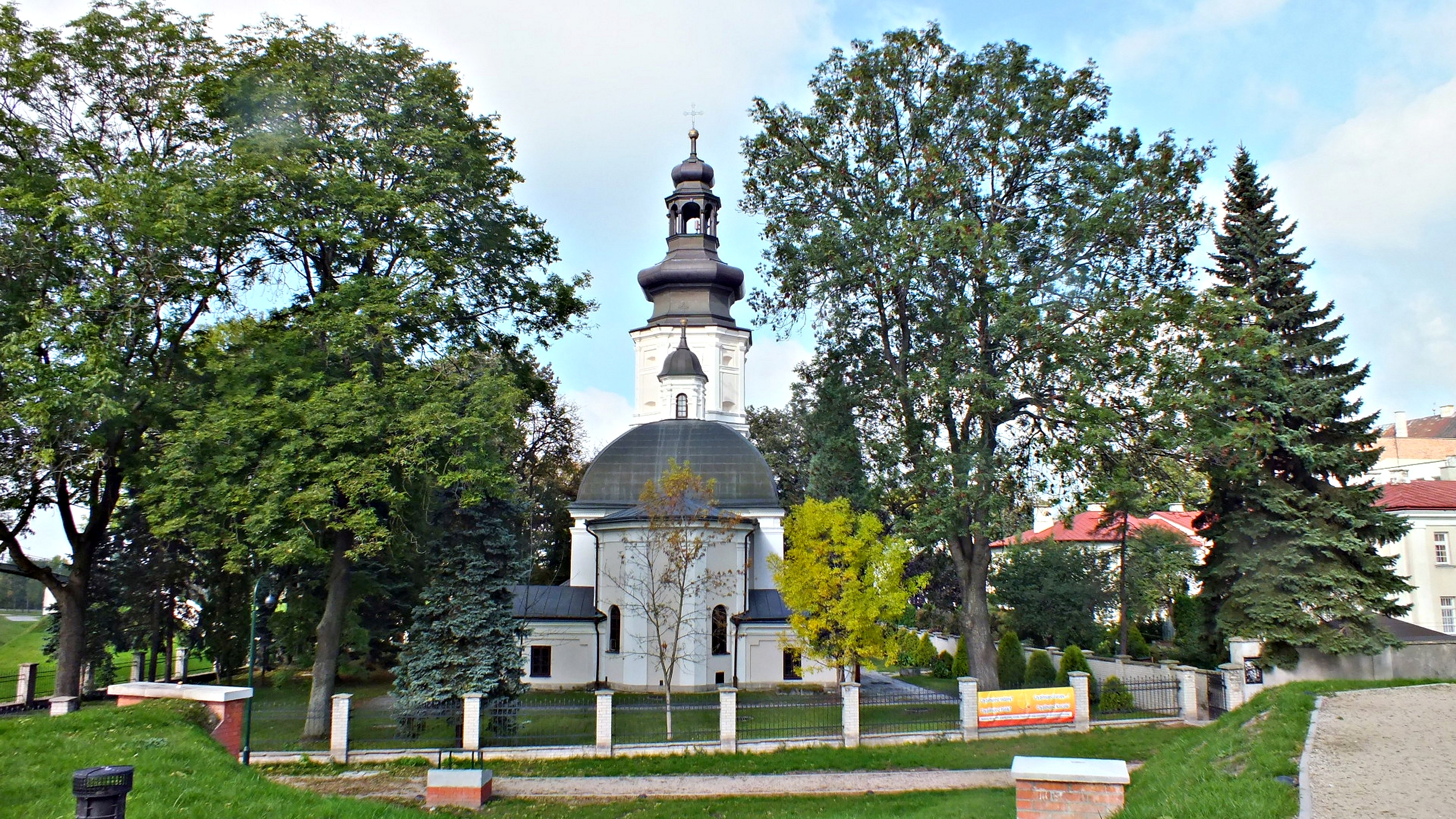 Zamość, cerkiew greko-kat. (bazylianów), ob. kościół rzym.-kat. p.w. św. Mikołaja, 1618-1631